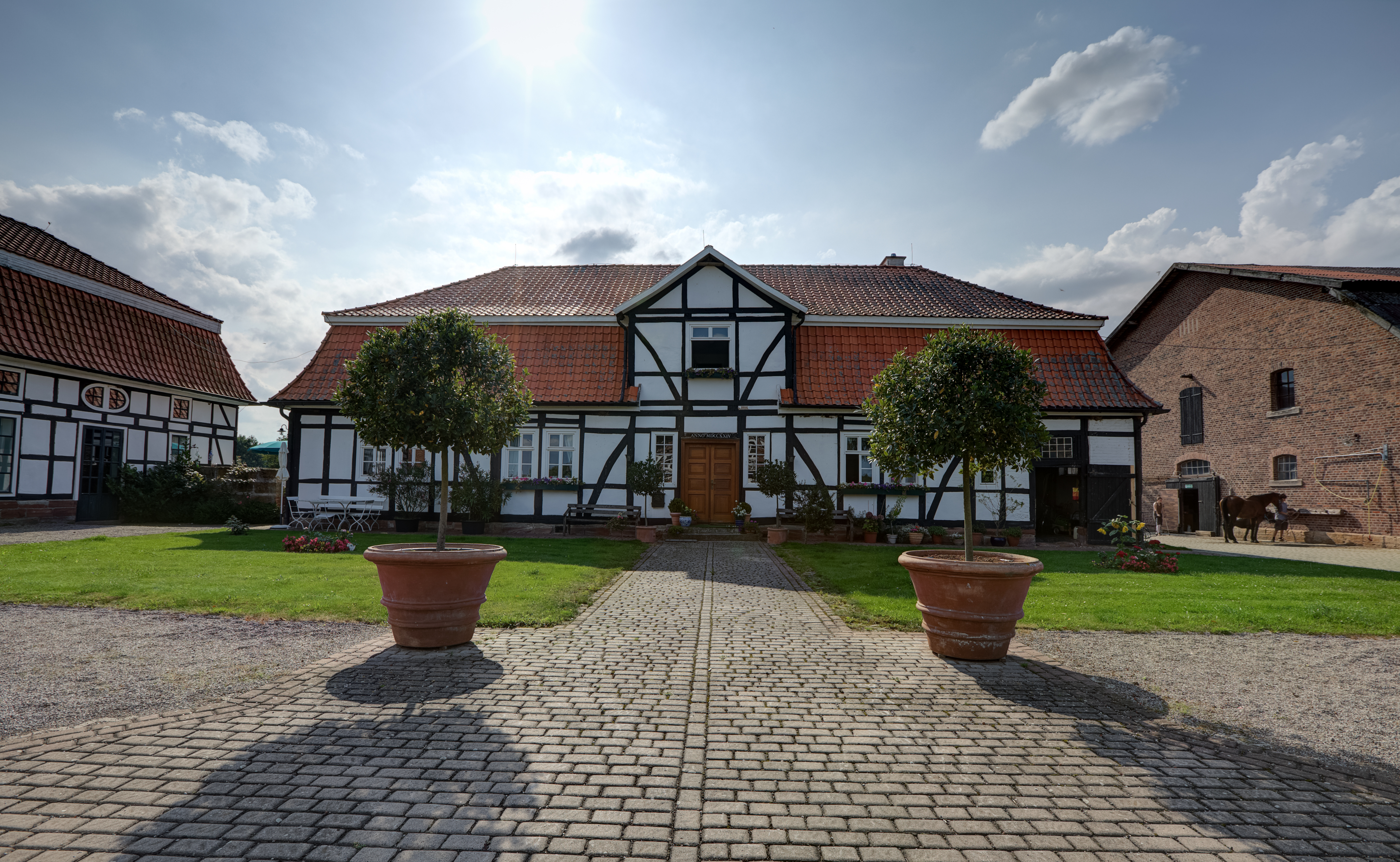 Eines der Nebenebäude auf dem Gut Marienhof bei Völkershausen (Wanfried), Hessen. Flur 1, Flurstück 25/3.